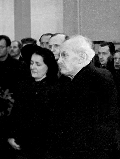 Karla Majerníková s ministrem čs.vlády prof.Zdeňkem Nejedlým na pohřbu Cypriána Majerníka